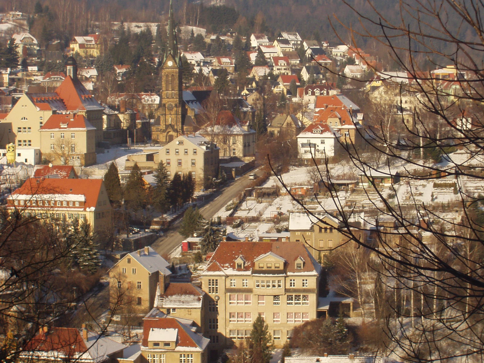 katholische Kirche in Sebnitz sowie Finkenberg (im Vordergrund)